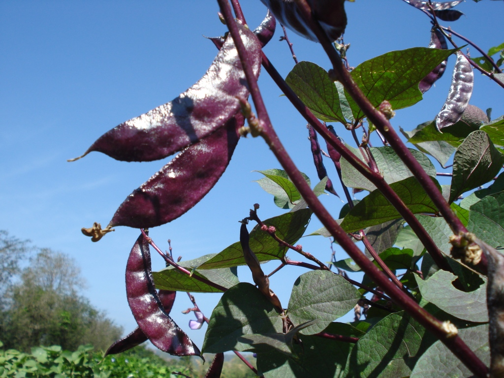 അമര